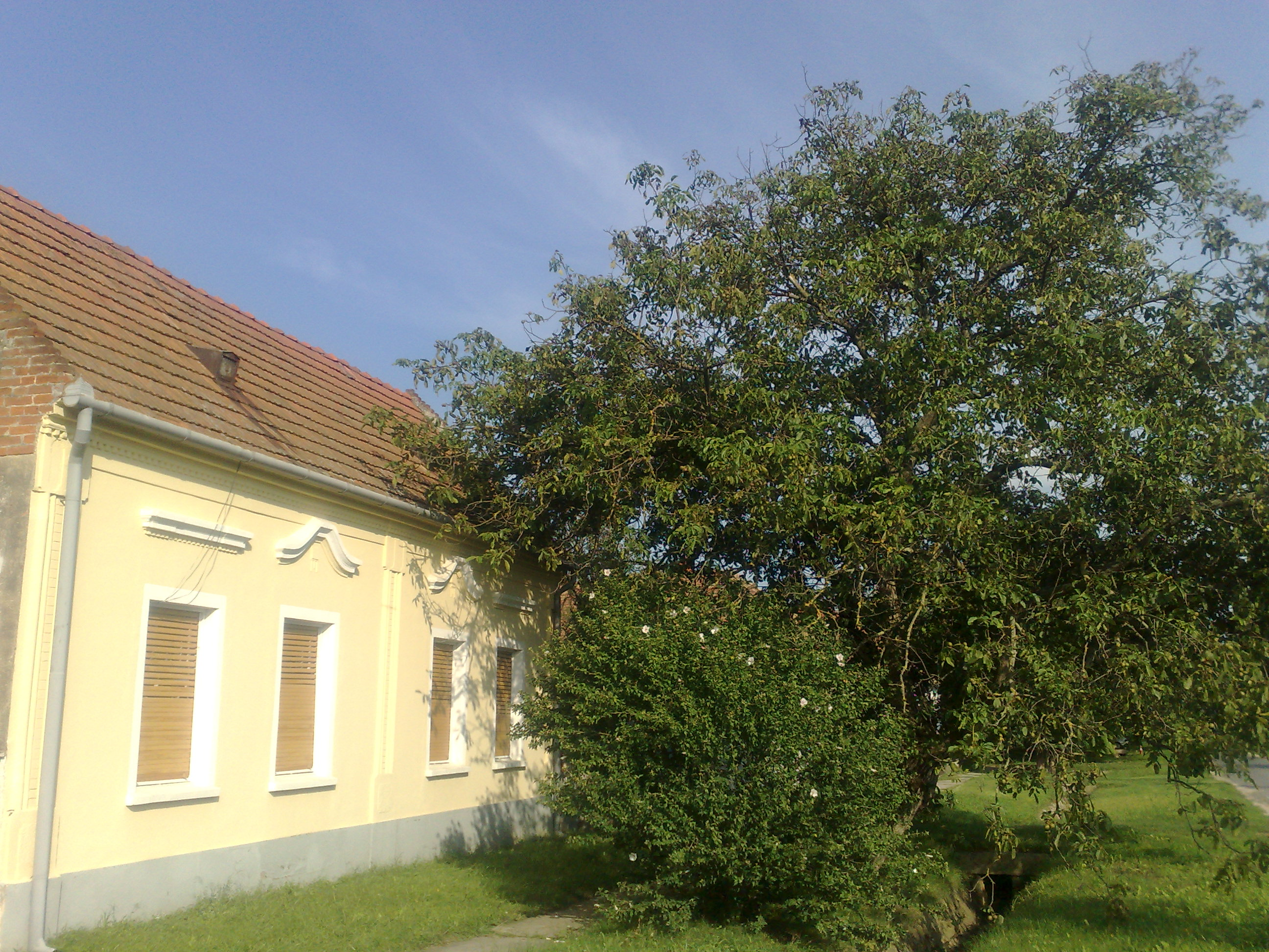 Árpás - régi parasztház az Andrássy utcában